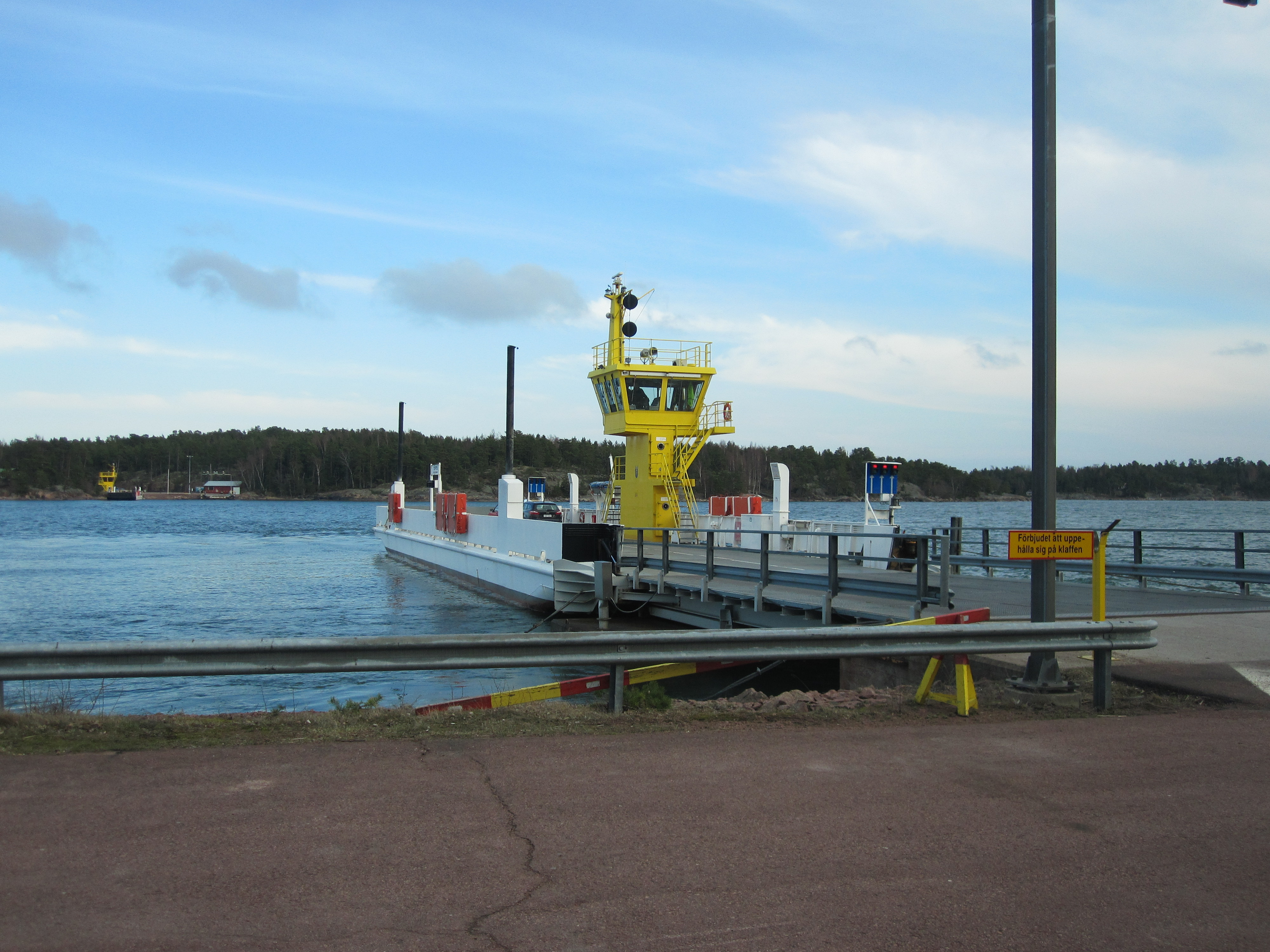 Локальный паром между островами архипелага